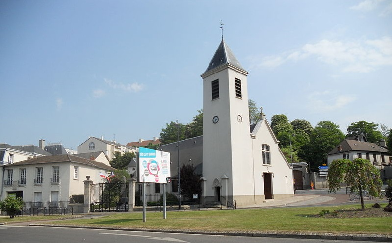 Pfarrkirche St. Gervais-St. Protais in Bry-sur-Marne, nahe Paris